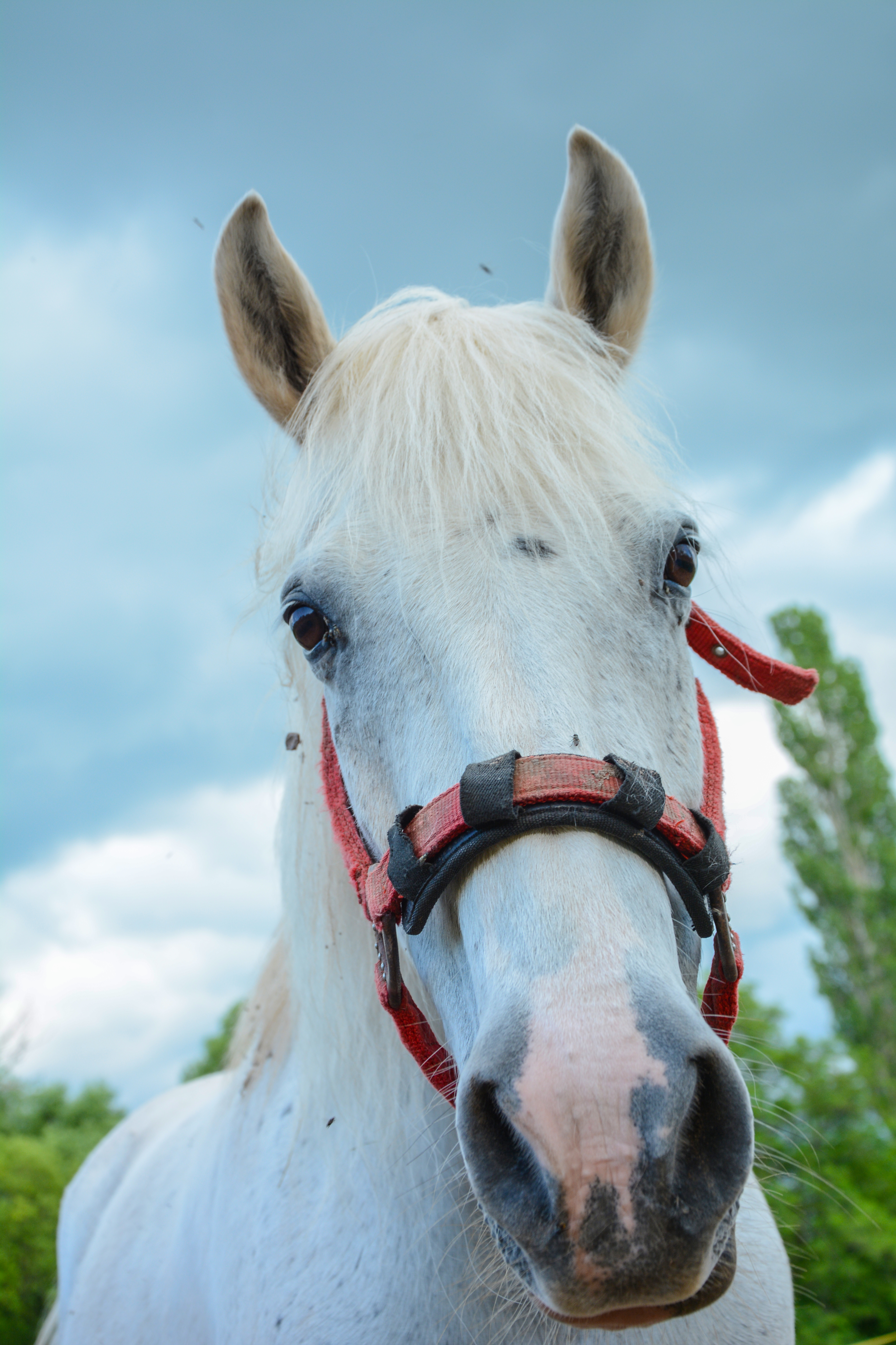 Зоо Кутак - прихватилиште за повређене дивље животиње